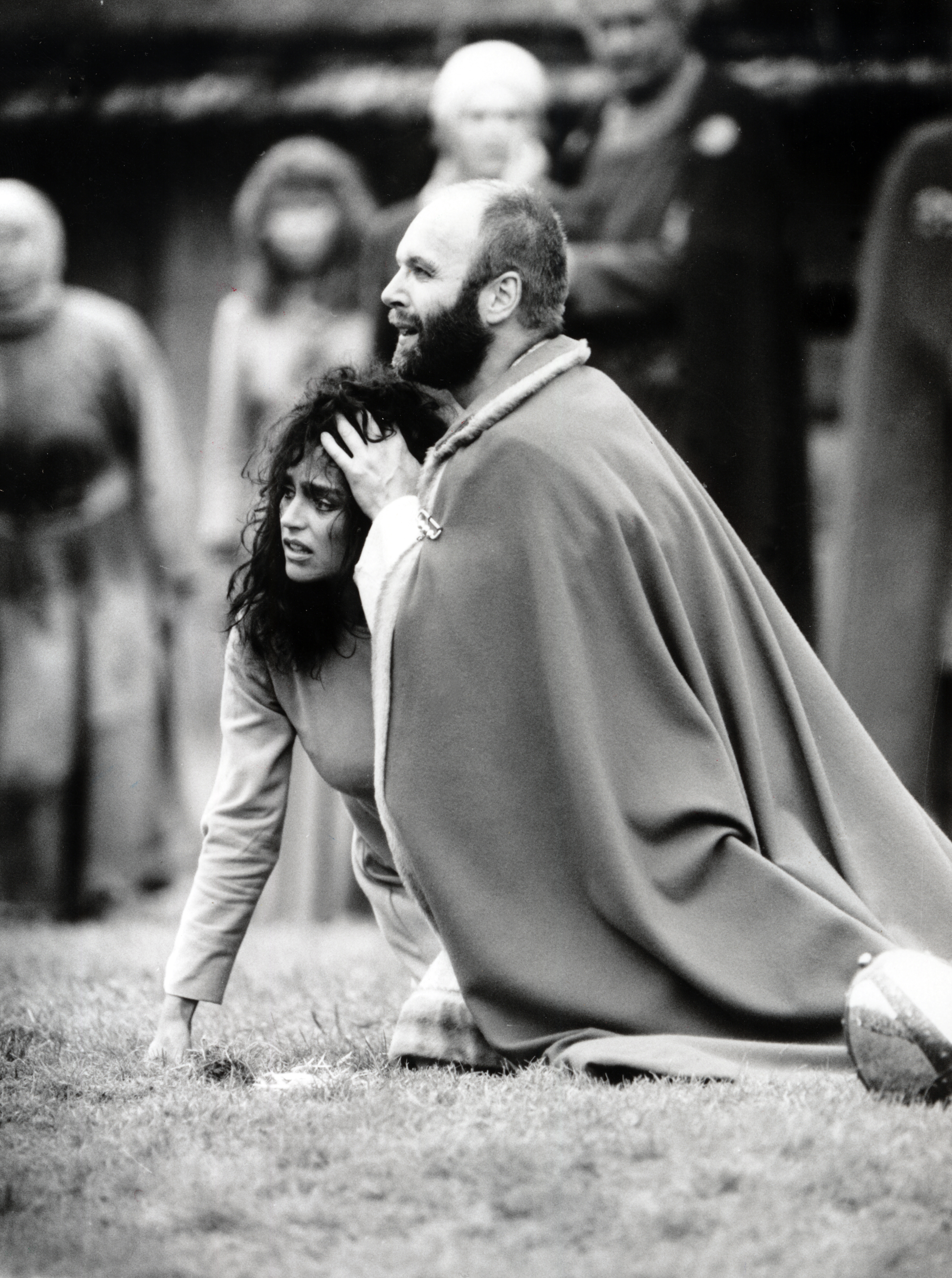 Norwegian actor Jan Grønli as king Olaf II of Norway in the The Saint Olav Drama at Stiklestad 1988.